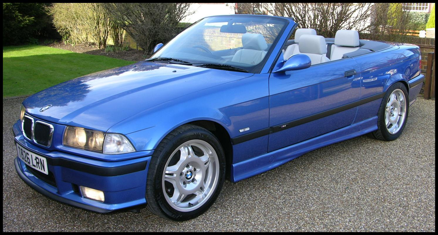 BMW M3 Evo E36 Convertible